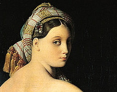 Détail de La Grande odalisque